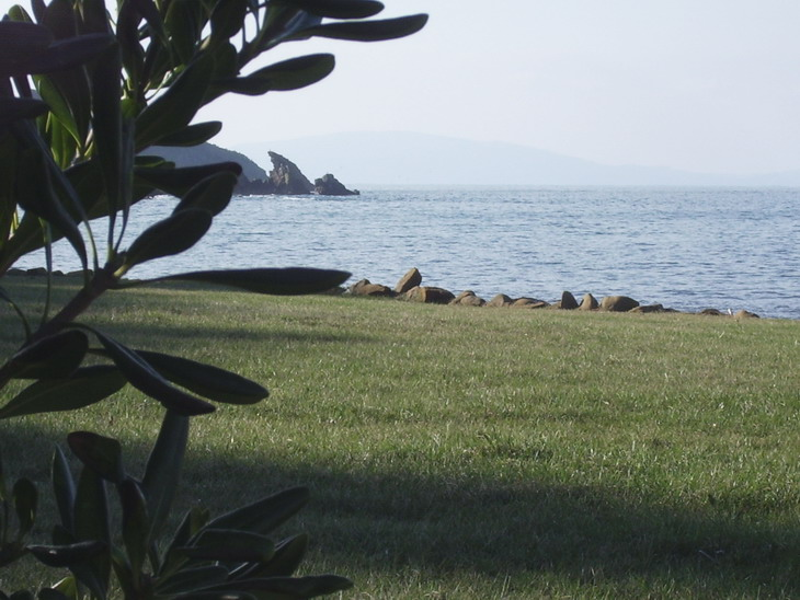 Parziale veduta degli Scogli Porchetti da Punta Ala (GR)